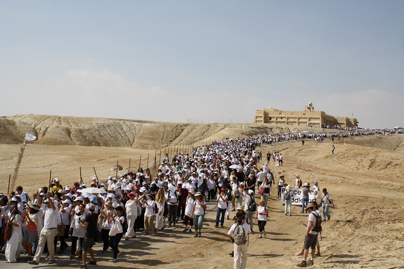 צעדת התקווה בקאסר אל יהוד, אוקטובר 2016